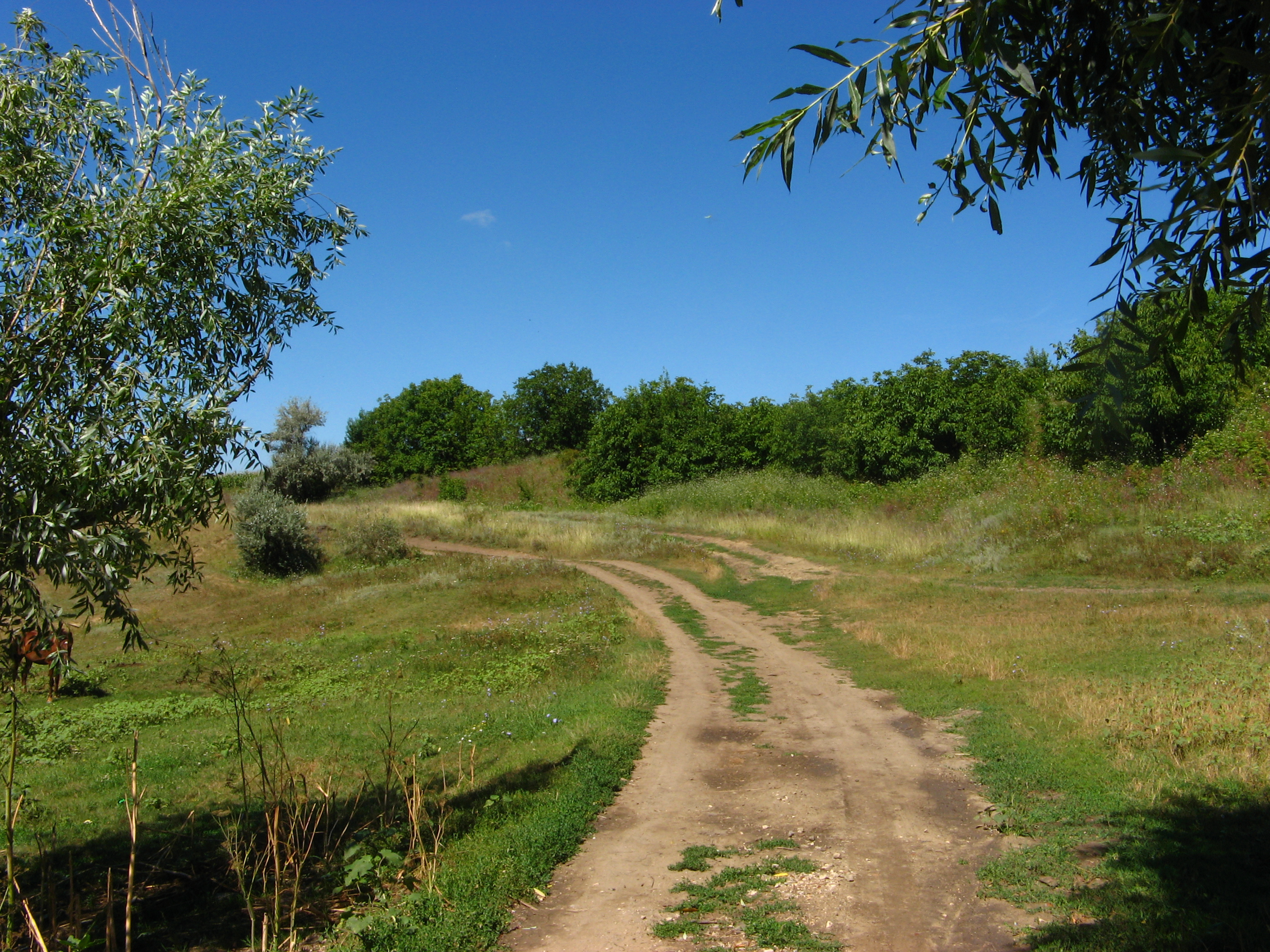 Drumeag de ţară ce duce în satul Cuizăuca.